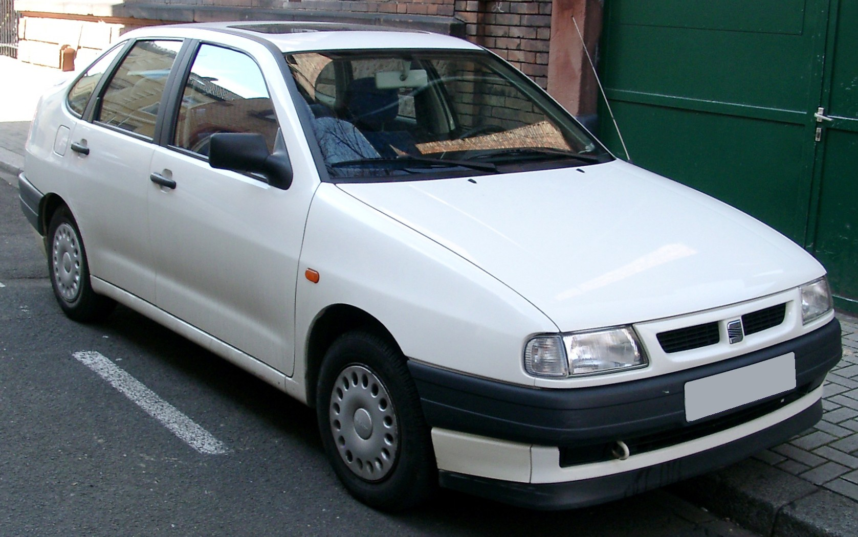 Seat Córdoba